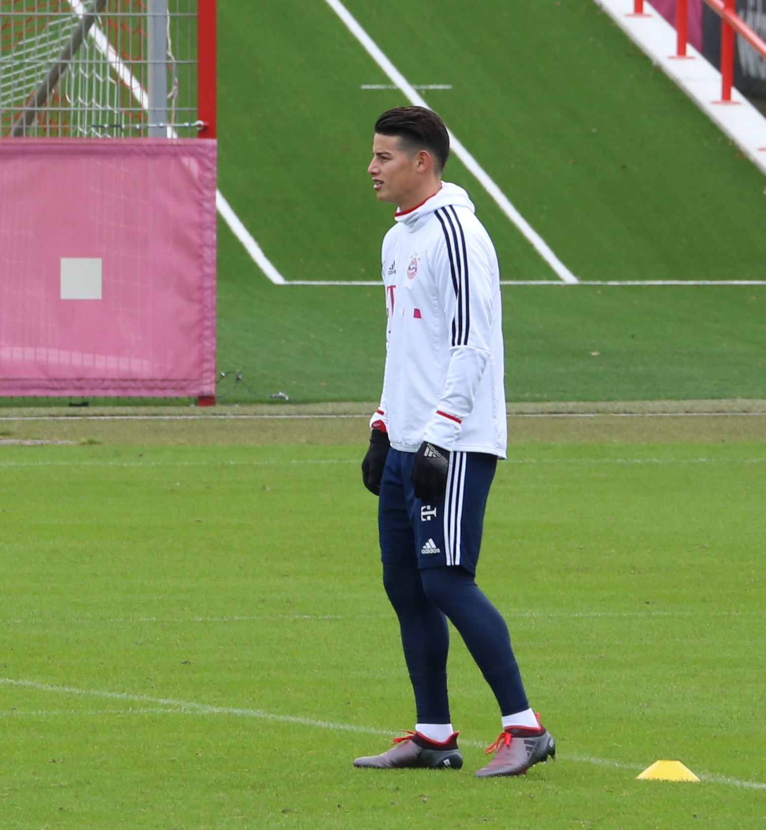 James Rodríguez beim Training auf dem Gelände des FC Bayern München (Januar 2018)